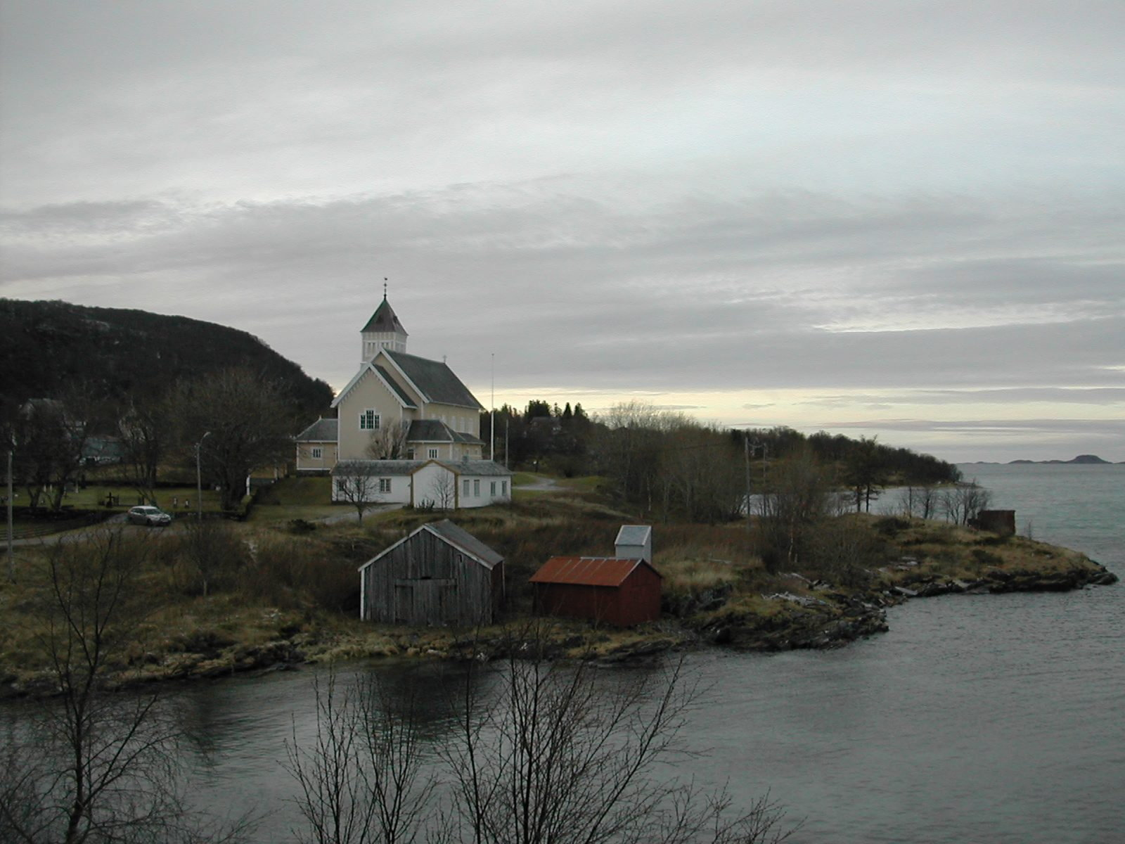 Leiranger kirke. Foto: Eva Smådahl. Fra Riksantikvarens Kulturminnesøk.